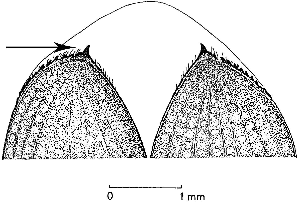 Dermesteselytren